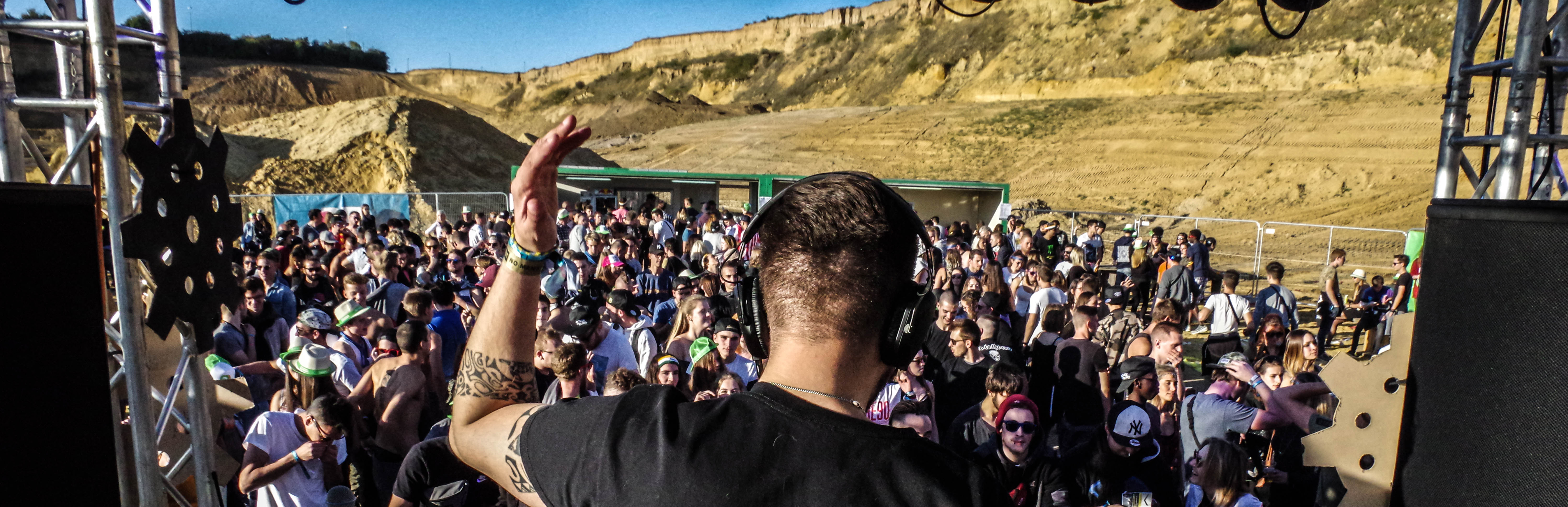 Le seul Desert Festival de Belgique dans la sablière de Mont-Saint-Guibert.